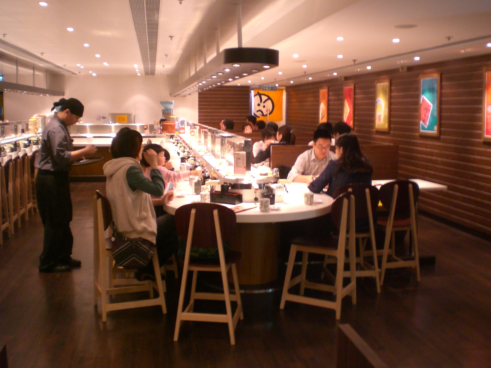 元朗區元朗新市鎮青山公路元朗段 元朗廣場 元氣壽司